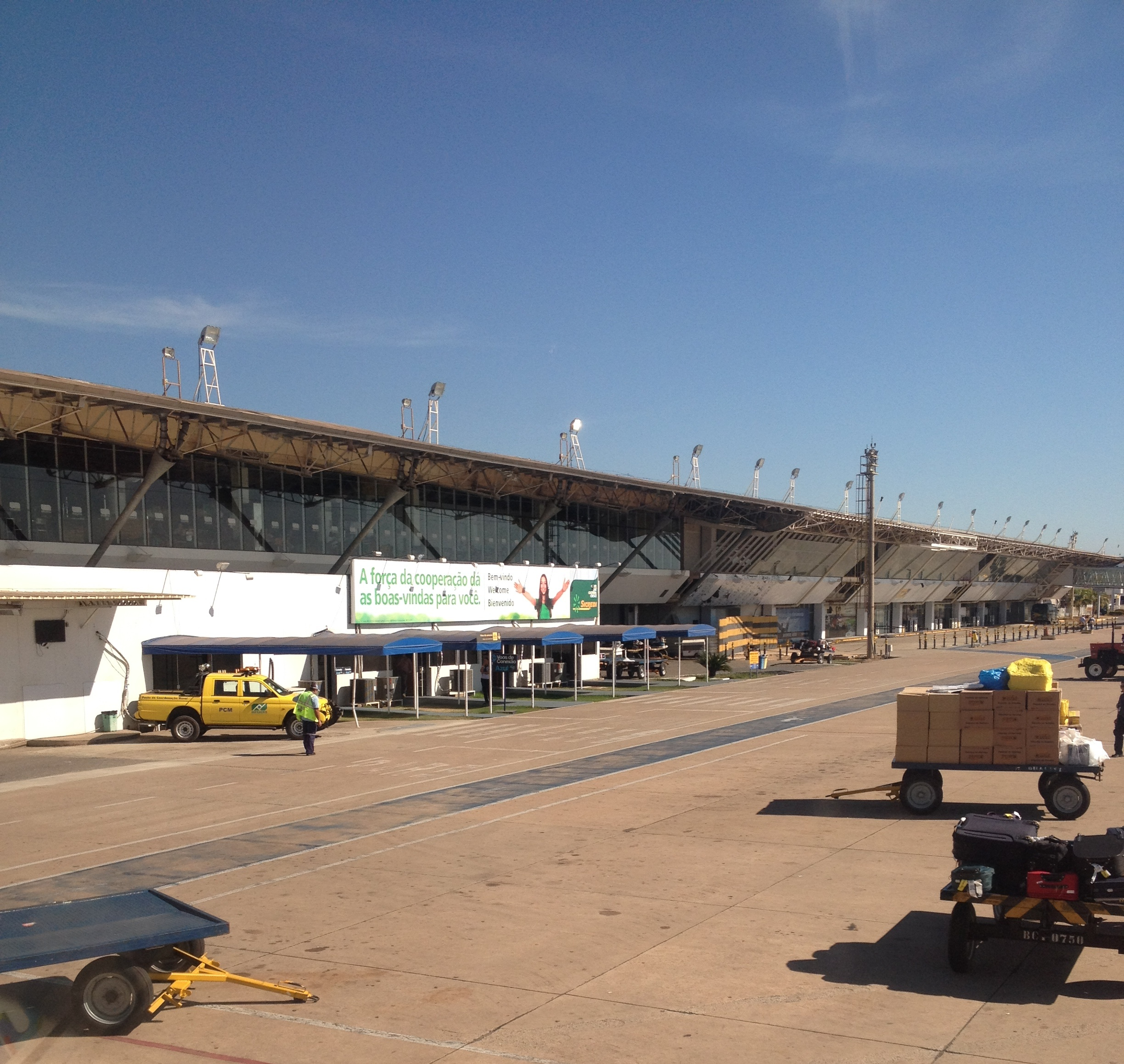 Aeroporto Internacional de Cuiabá, após a reforma para a Copa do Mundo de 2014